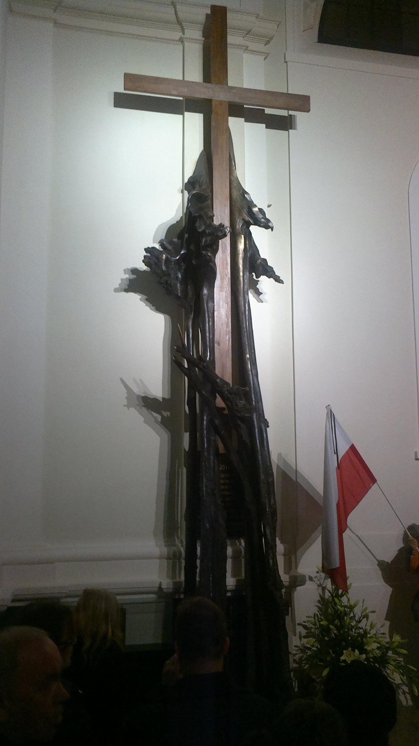 Pomnik pamięci ofiar katastrofy smoleńskiej odsłonięty w kościele św. Annny w Warszawie 25 listopada 2012 roku